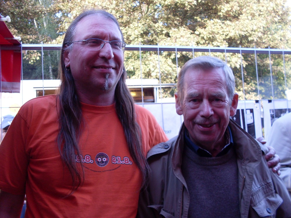 Václav Havel a Vladimír Drápal